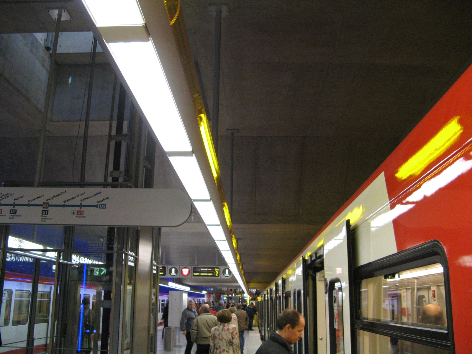 Beleuchtung mit Leuchtdioden im U-Bahnhof Gustav-Adolf-StraßŸe in Nürnberg, Bayern, Deutschland.